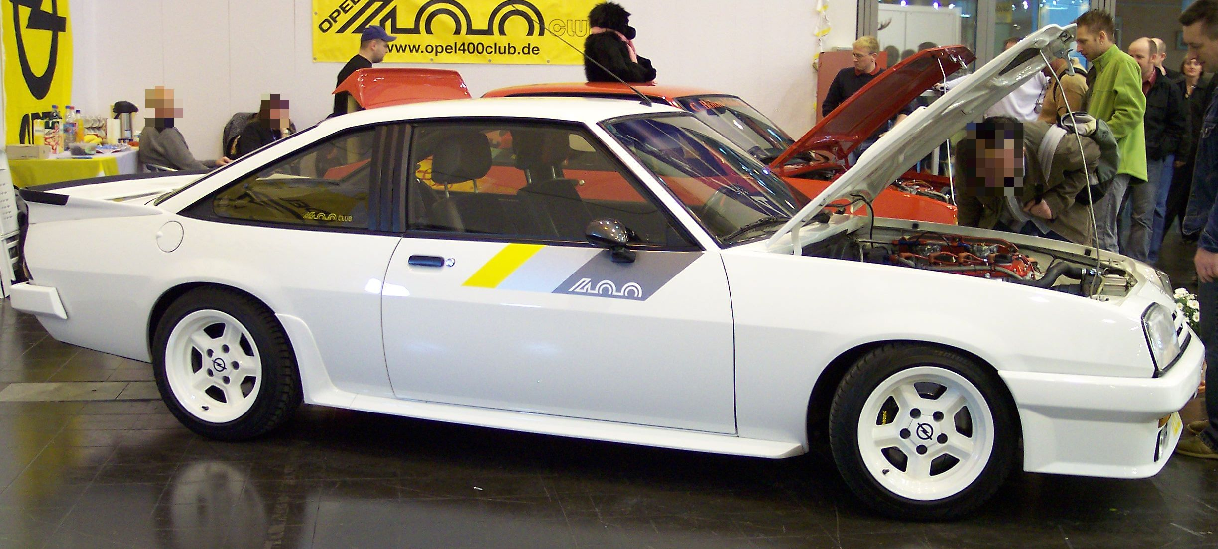 Opel Manta 400i